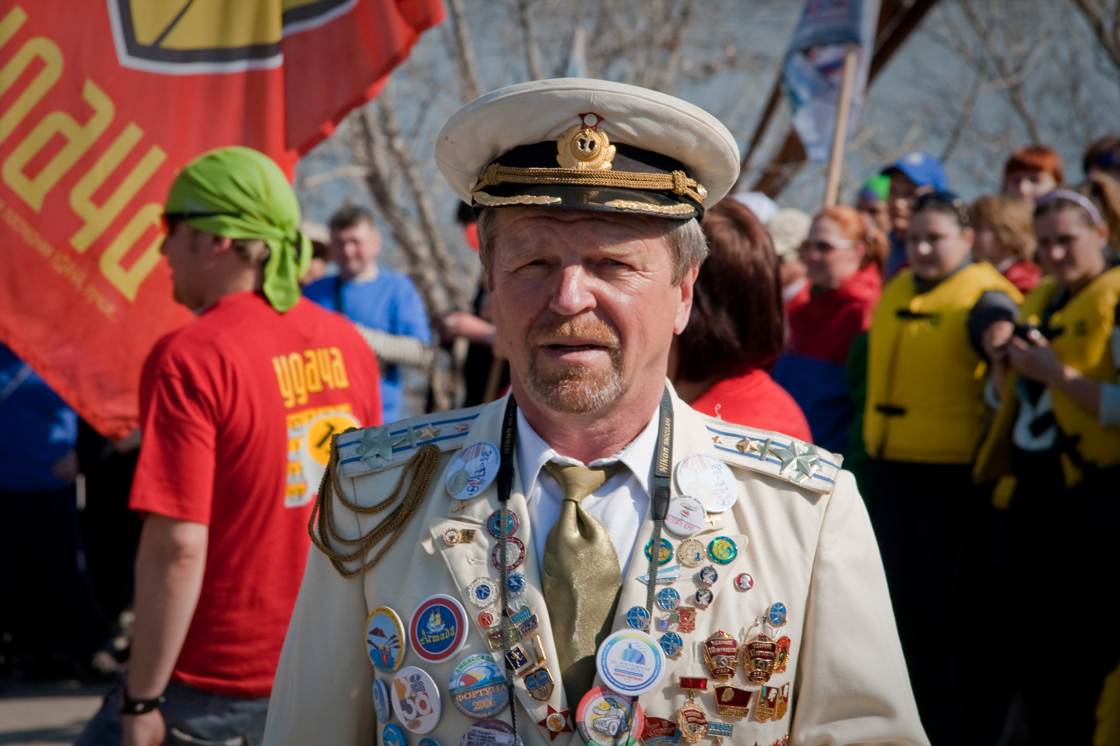 43-я Жигулёвская кругосветка